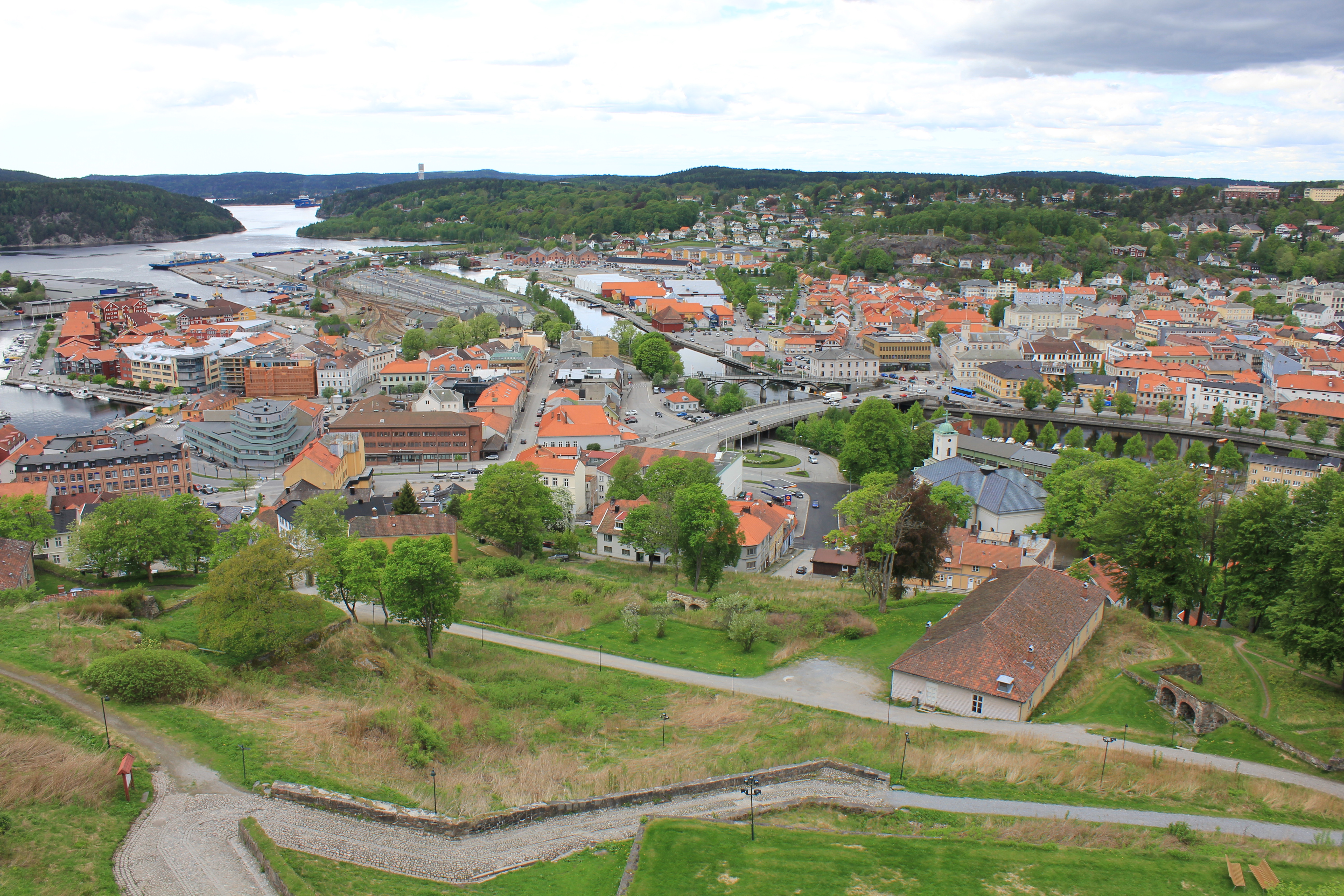 Halden sentrum.